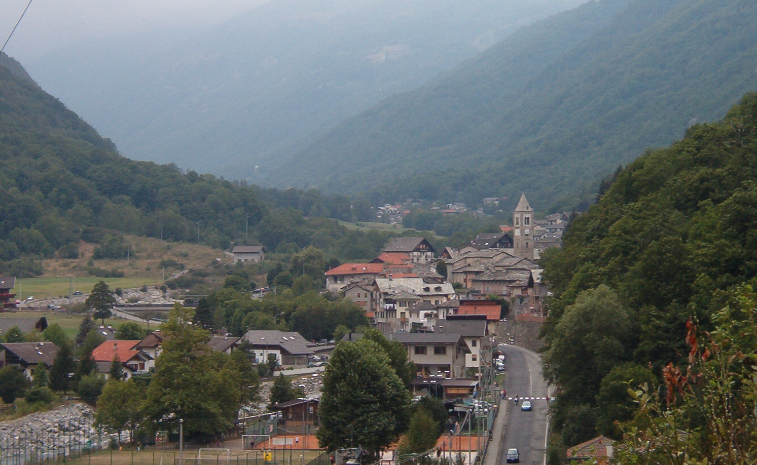 Chialamberto - provincia di Torino - Piedmont - Italy